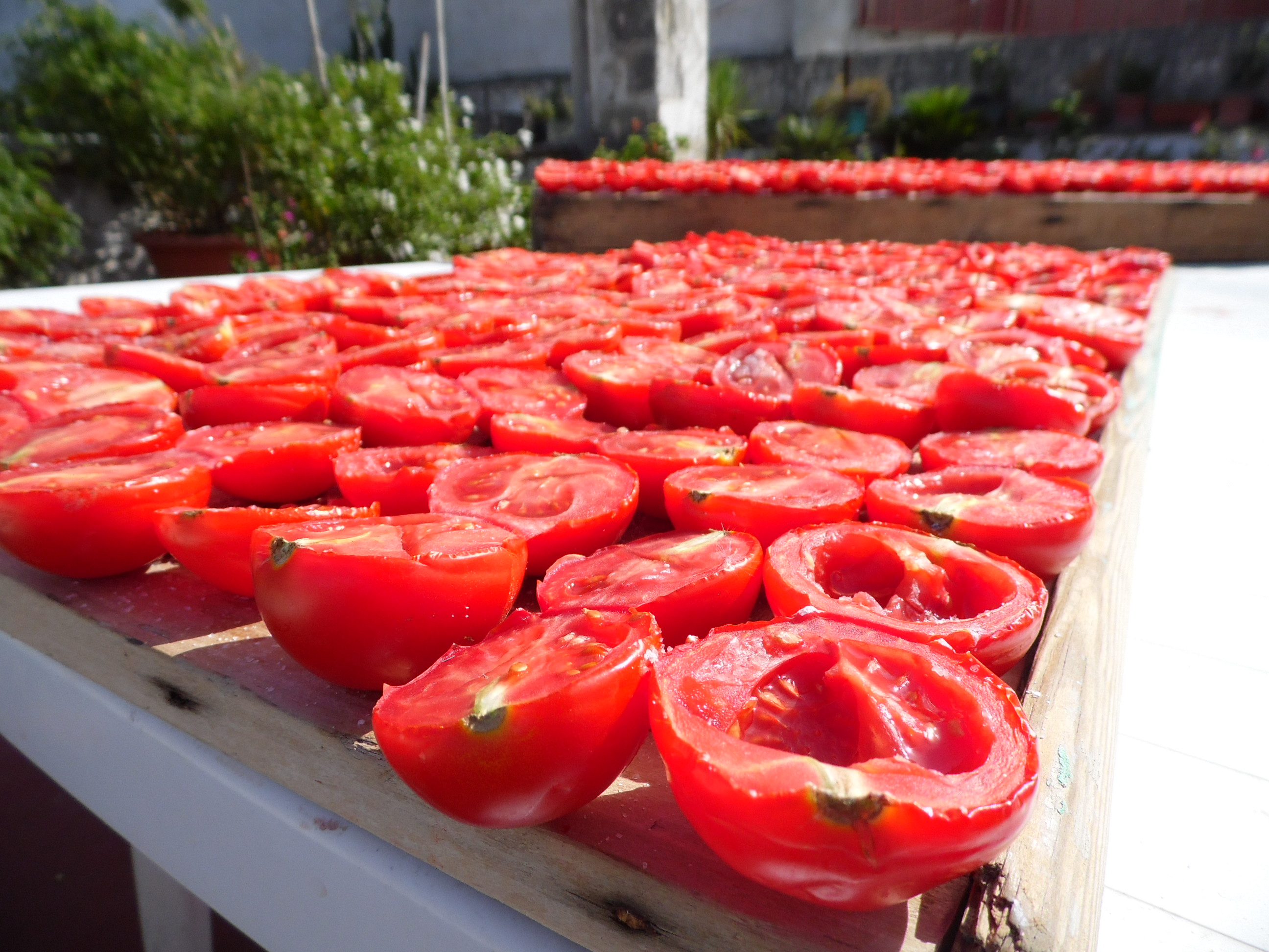 Pomodori